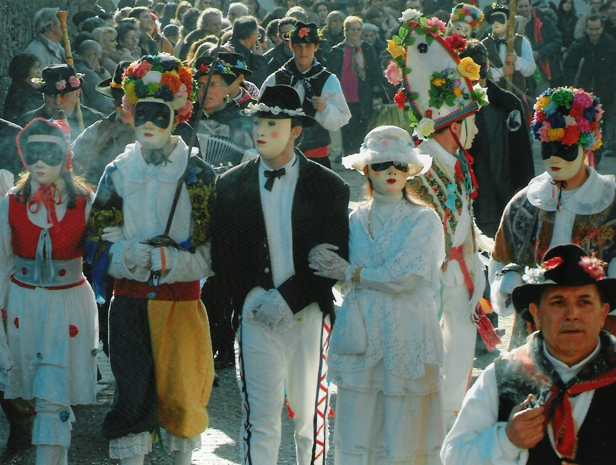 La Lachera di Rocca Grimalda 2004